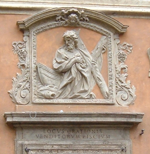 Particolare della Chiesa di Sant'Andrea dei Pescivendoli, nel rione Sant'Angelo a ROma. Foto personale.